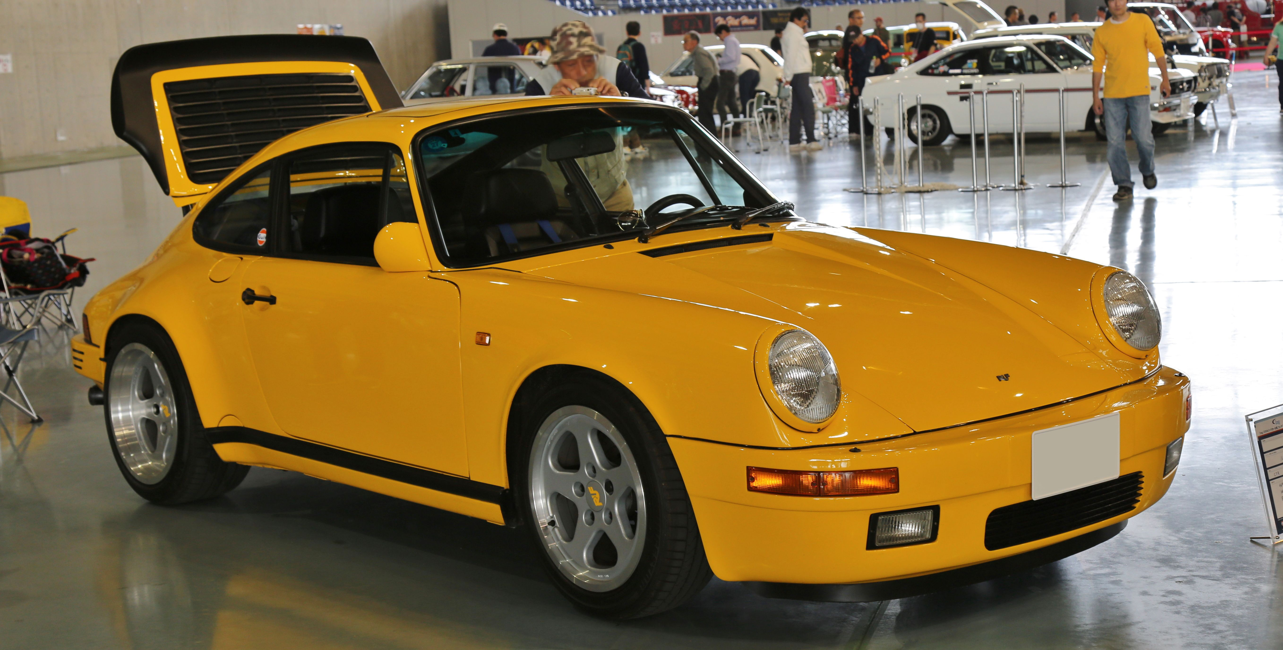 1989 RUF CTR